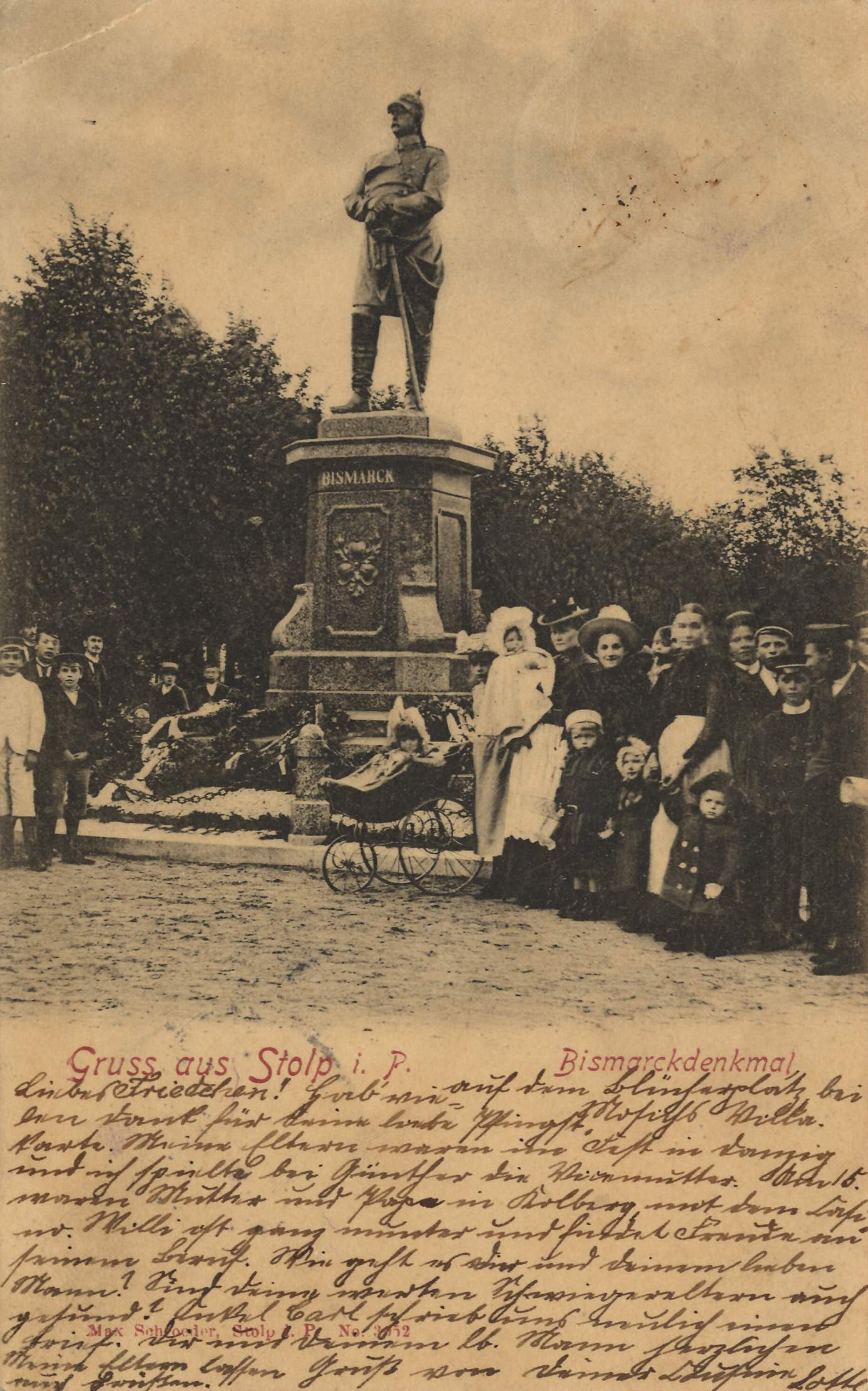 Bismarckdenkmal